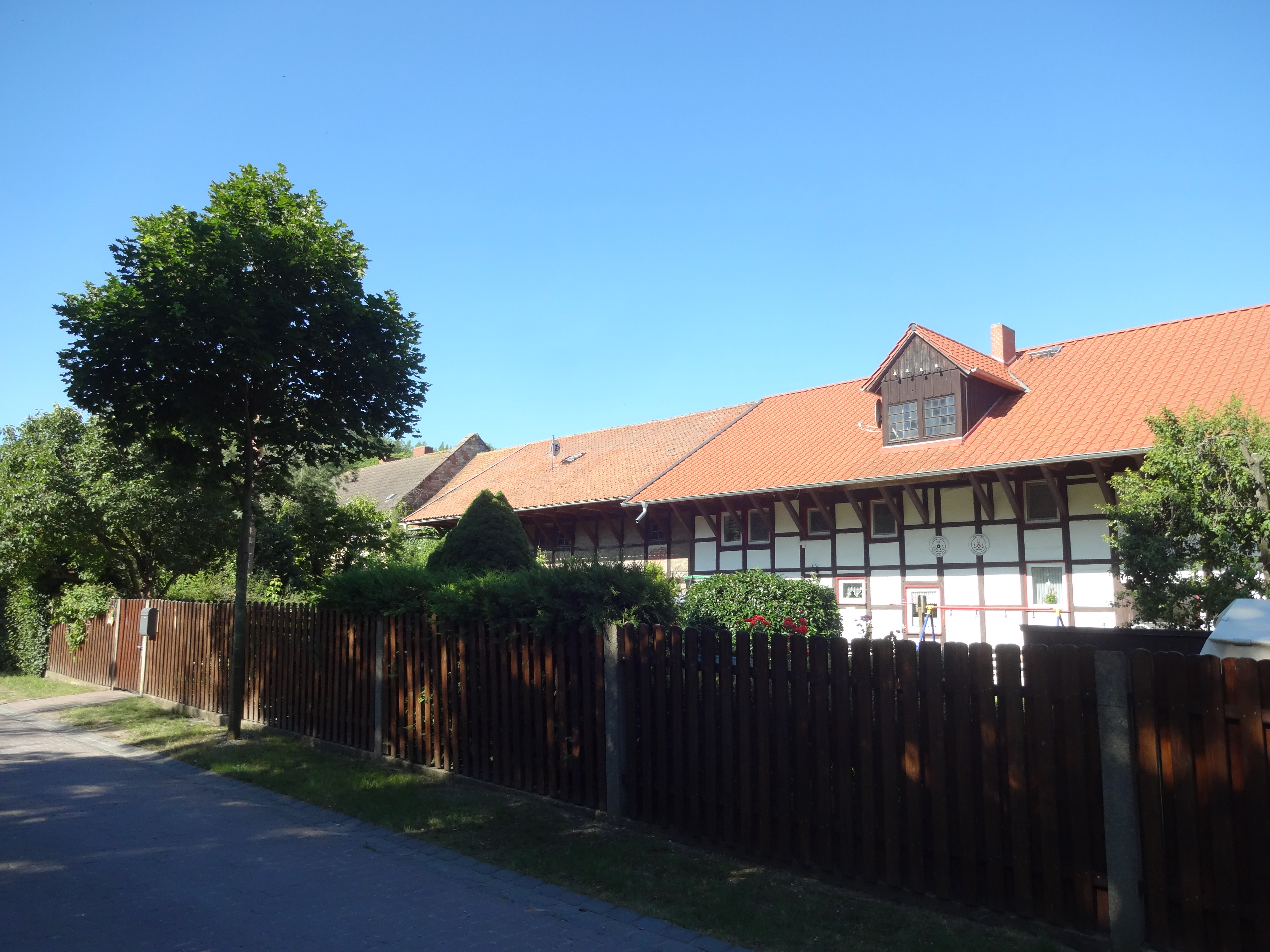 denkmalgeschützter Amtshof 9, 10 in Langeln in der Gemeinde Nordharz, hier Nr. 10